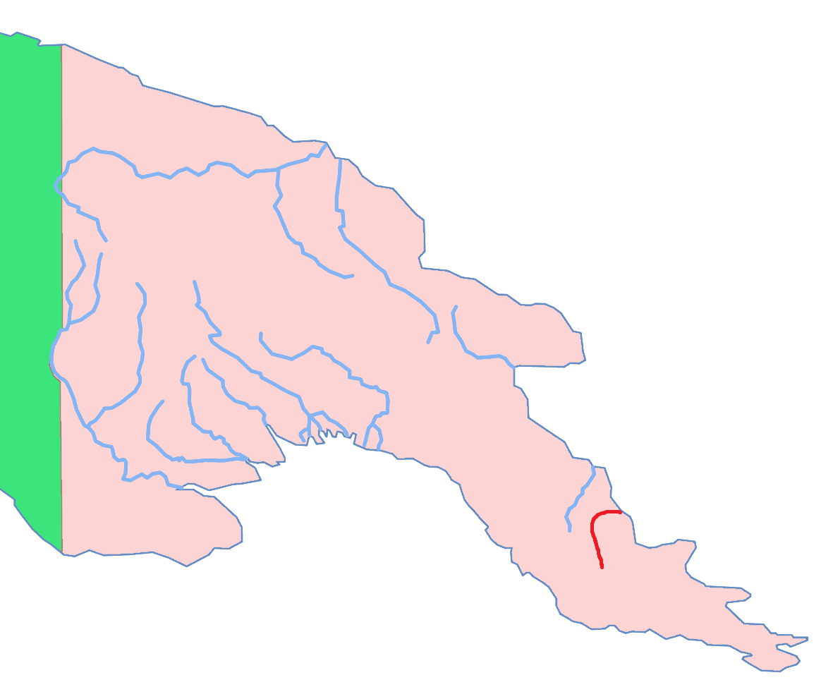 Kumusi (Fluss) in Papua-Neuguinea